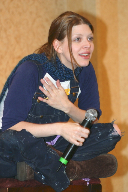 Amber BensonAmber Benson - Houston, Tx